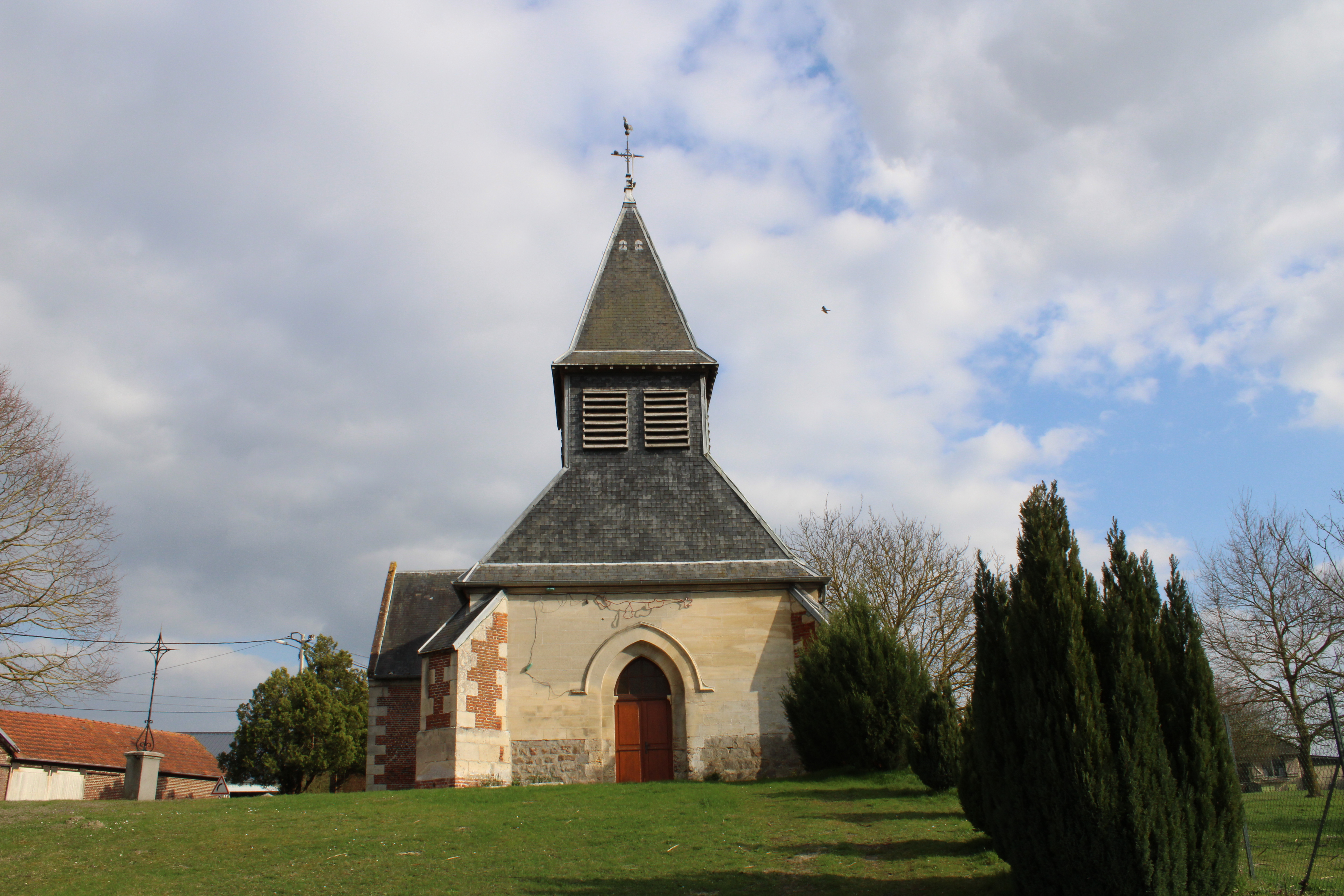 L'église.